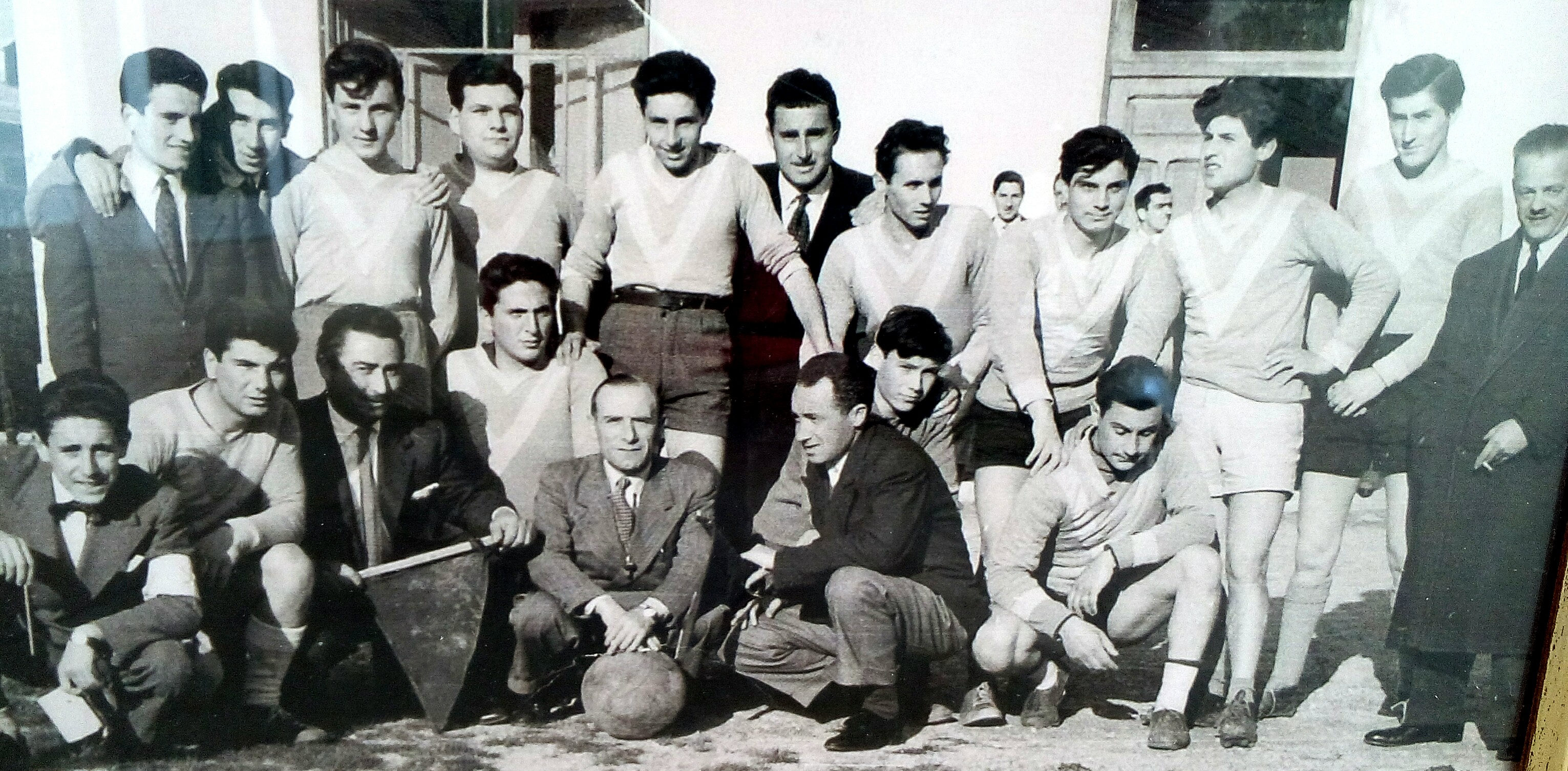 Vecchia formazione del Tagliacozzo calcio